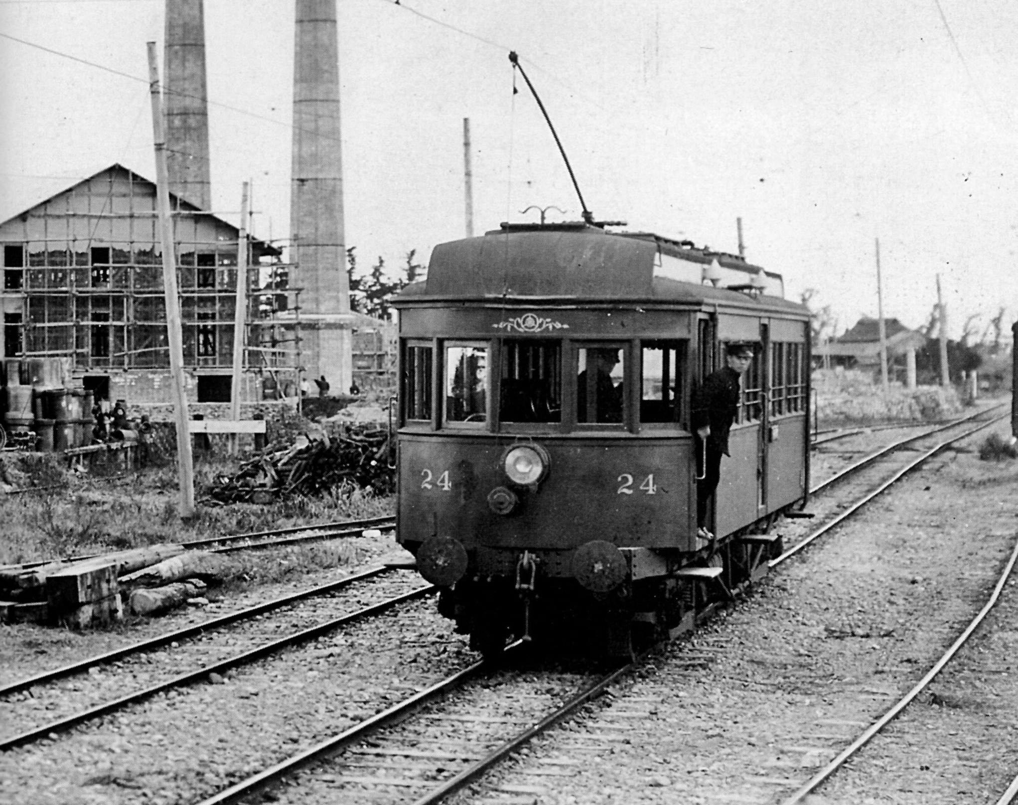 建設中の伊奈製陶所と電車